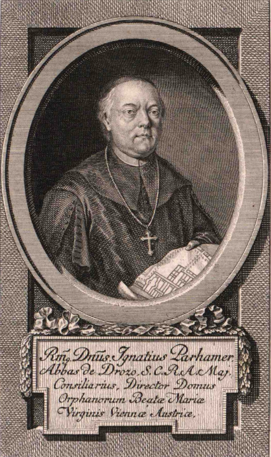 Porträt Ignaz Parhamer (1715-1786)